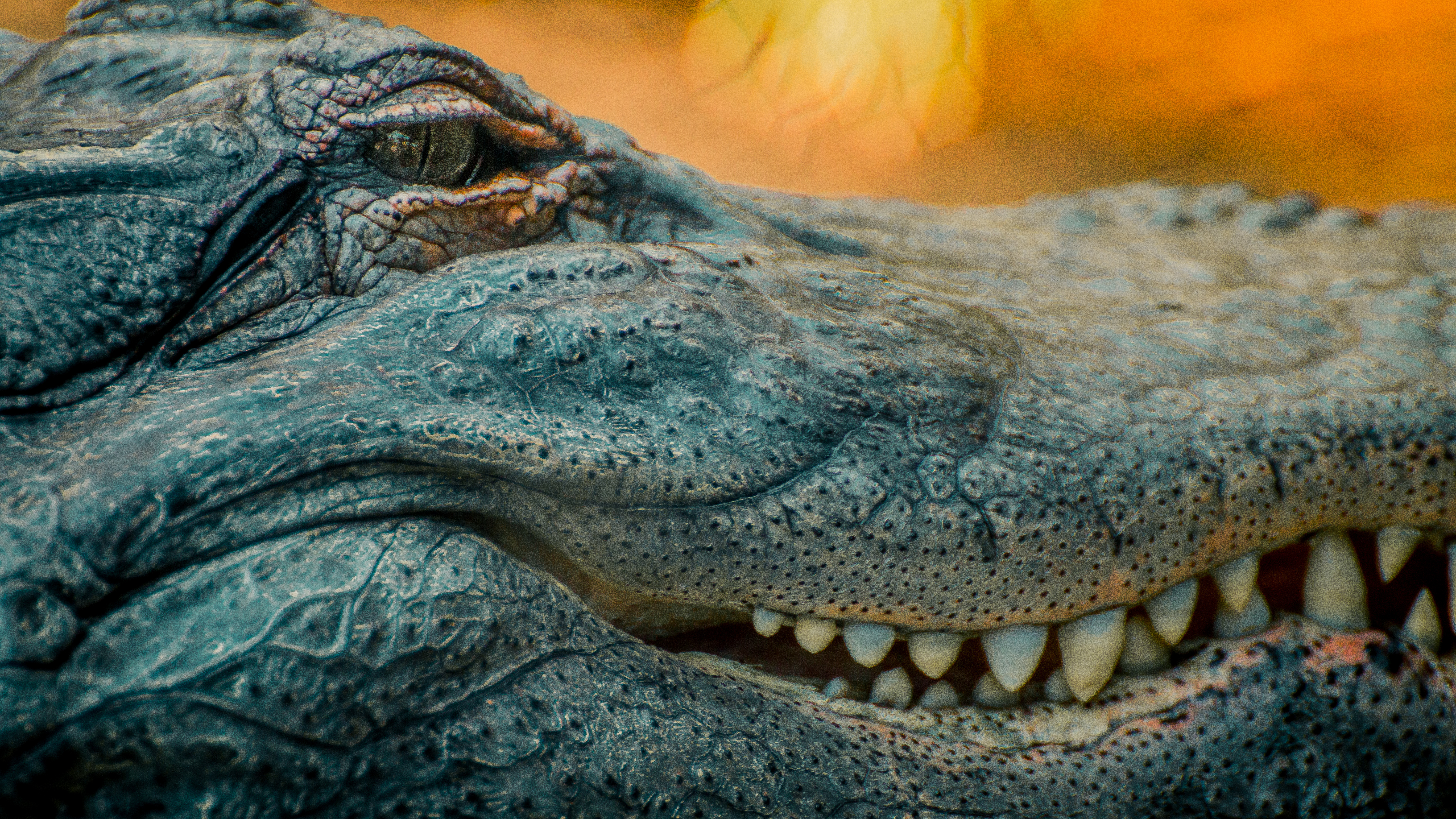 Gros plan sur la gueule entrouverte d'un alligator.